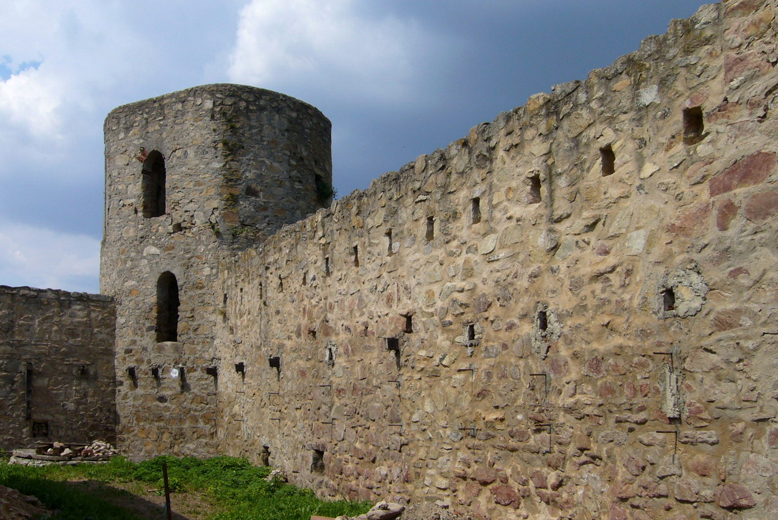 Kestřany (horní tvrz) – okrouhlá věž v severním nároží je na vnitřní straně zploštělá